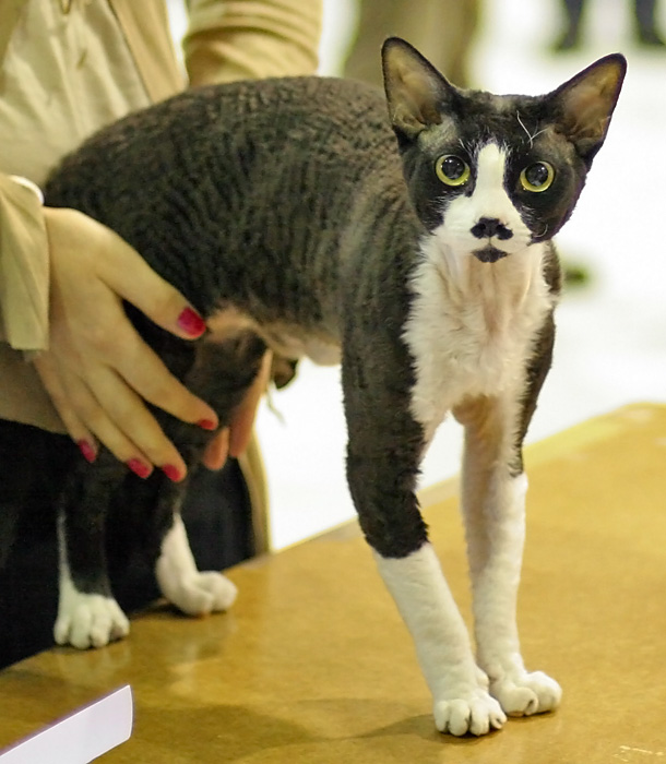 Un devon rex noir et blanc, mâle champion d'Europe à l'exposition féline de Jyväskylä en 2007.